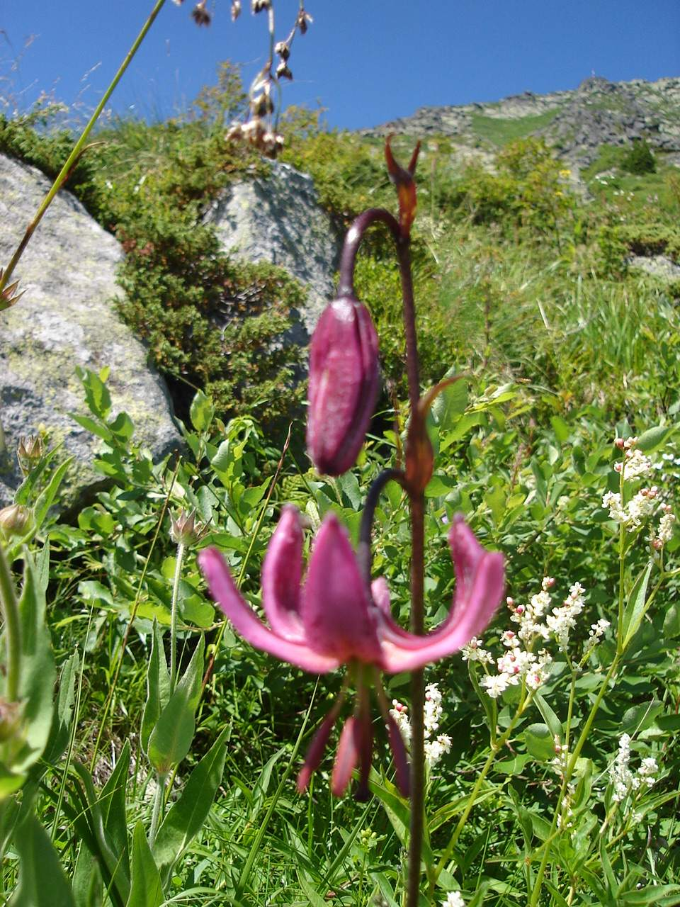 Vitosha mountain, Bulgaria (Lilium martagon)